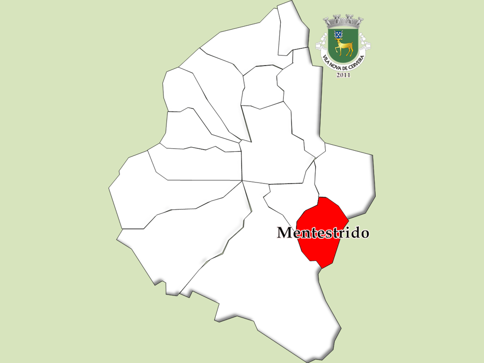 Censos 1864/2011